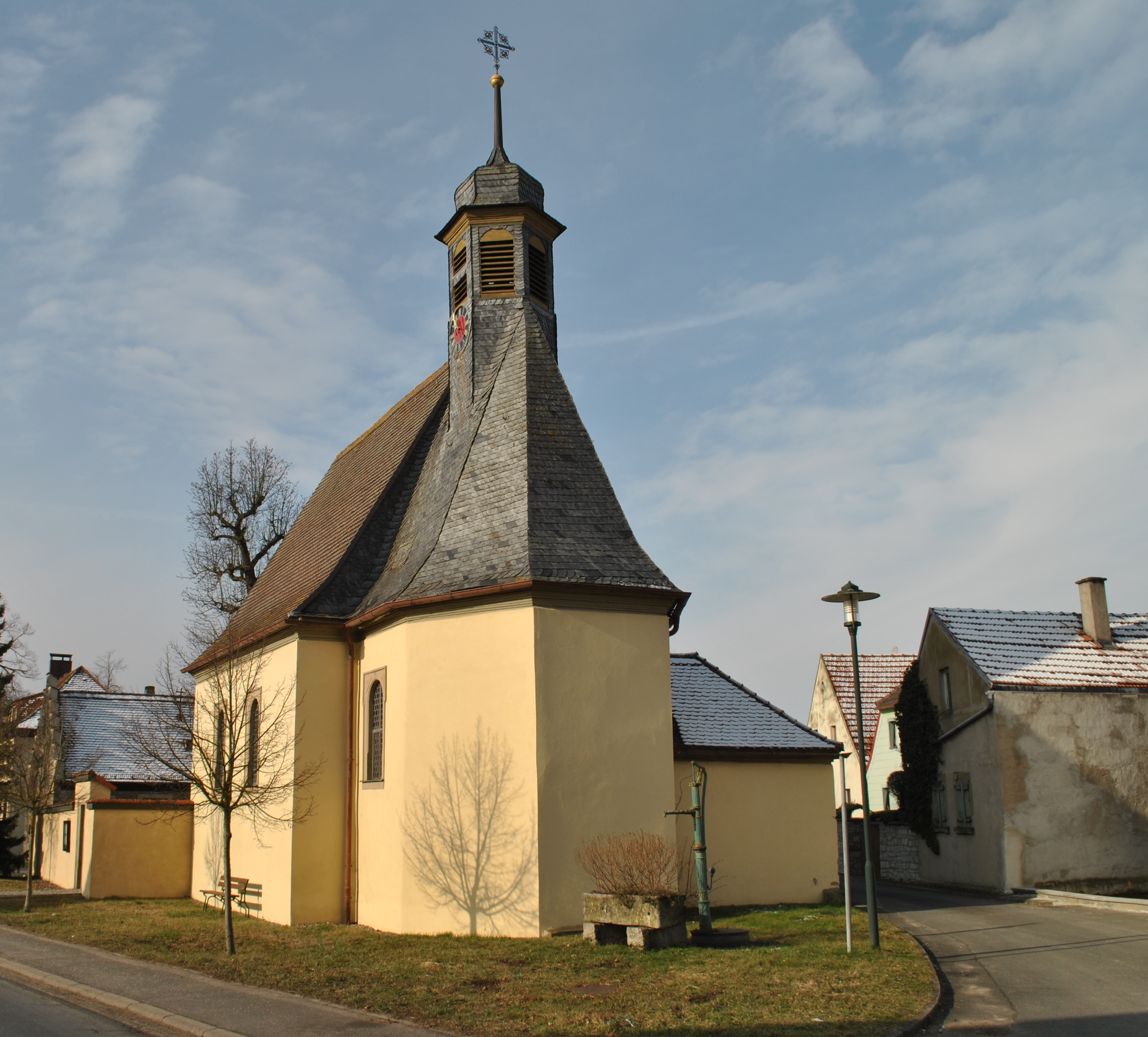 Katholische Filialkirche St. Michael Saalbau mit eingezogenem polygonalem Chor und Dachreiter, erbaut 1688, Anbauten 1779/1780; mit Ausstattung D-6-75-165-5